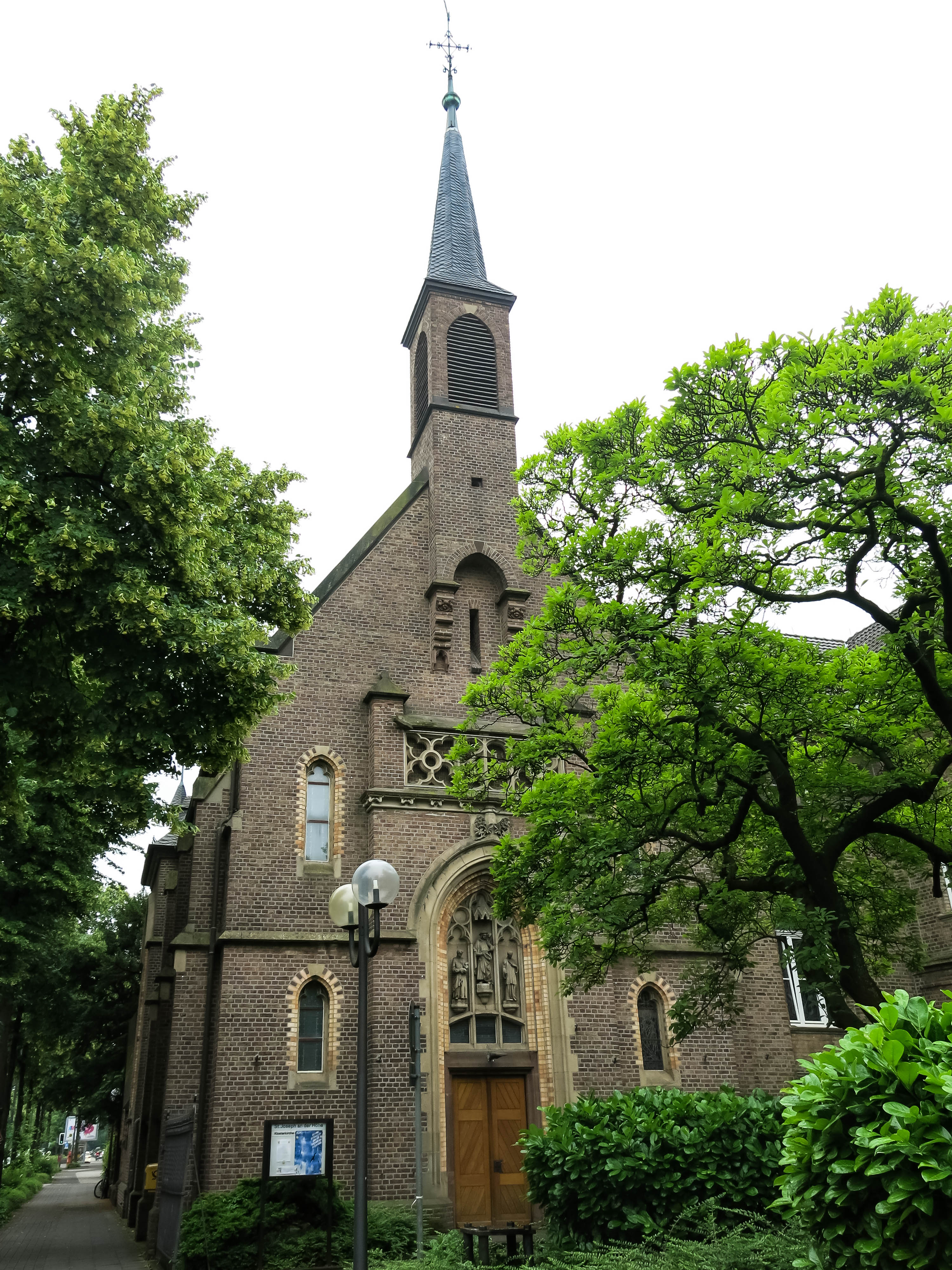 Klosterkirche St. Joseph des Redemptoristenordens (erbaut von Heinrich Wiethase) auf der Josefshöhe in Bonn-Auerberg. An unteren Bildrand ist der gusseiserne Tisch des Basispunkt C erkennbar.